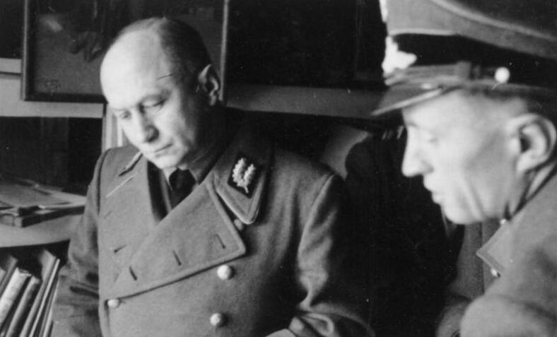 Minsk, 1.Dez. 1942 Gauleiter Kube, Pg. Walter Einsatzstab Reichsleiter Rosenberg für die besetzten Gebiete - Hauptarbeitsgruppe Ostland Film: 49/26